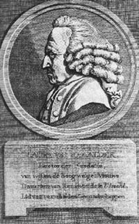 Laurens Praalder. De tekst onder dit door de graficus Pieter Hendrik Jonxis (1757-1843) in 1778 vervaardigde medaillon luidt: "LAURENS PRAALDER, / Lector der Fundatie,/ van wijlen de hoogwelgeb: Vrouwe / Douariere van Renswoude te Utrecht. / Lid van verscheiden Genootschappen"